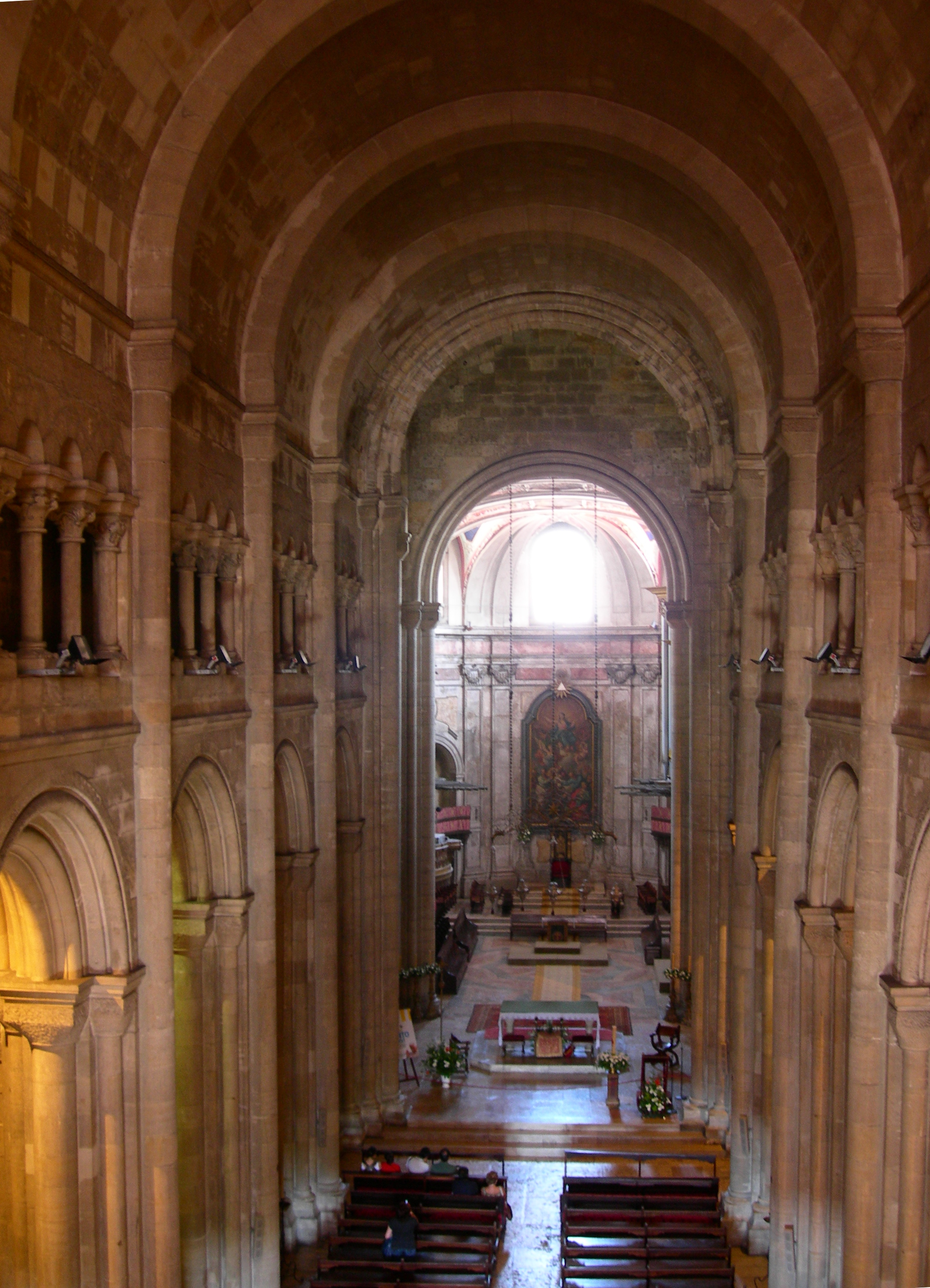 Se de lisboa (interior) II This file was uploaded for Wiki Loves Monuments in Portugal with the unique identifier 70502.